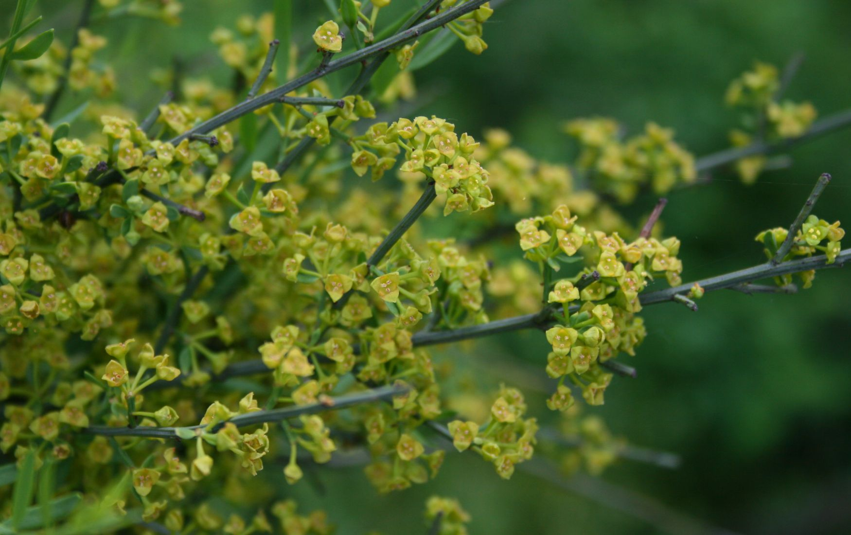 Osyris alba, Sandelholzgewächse (Santalaceae) - Italien/Italia/Italy: Friuli-Venezia Giulia, Prov. Trieste, Sistiana, Rilkeweg/Sentiero Rilke